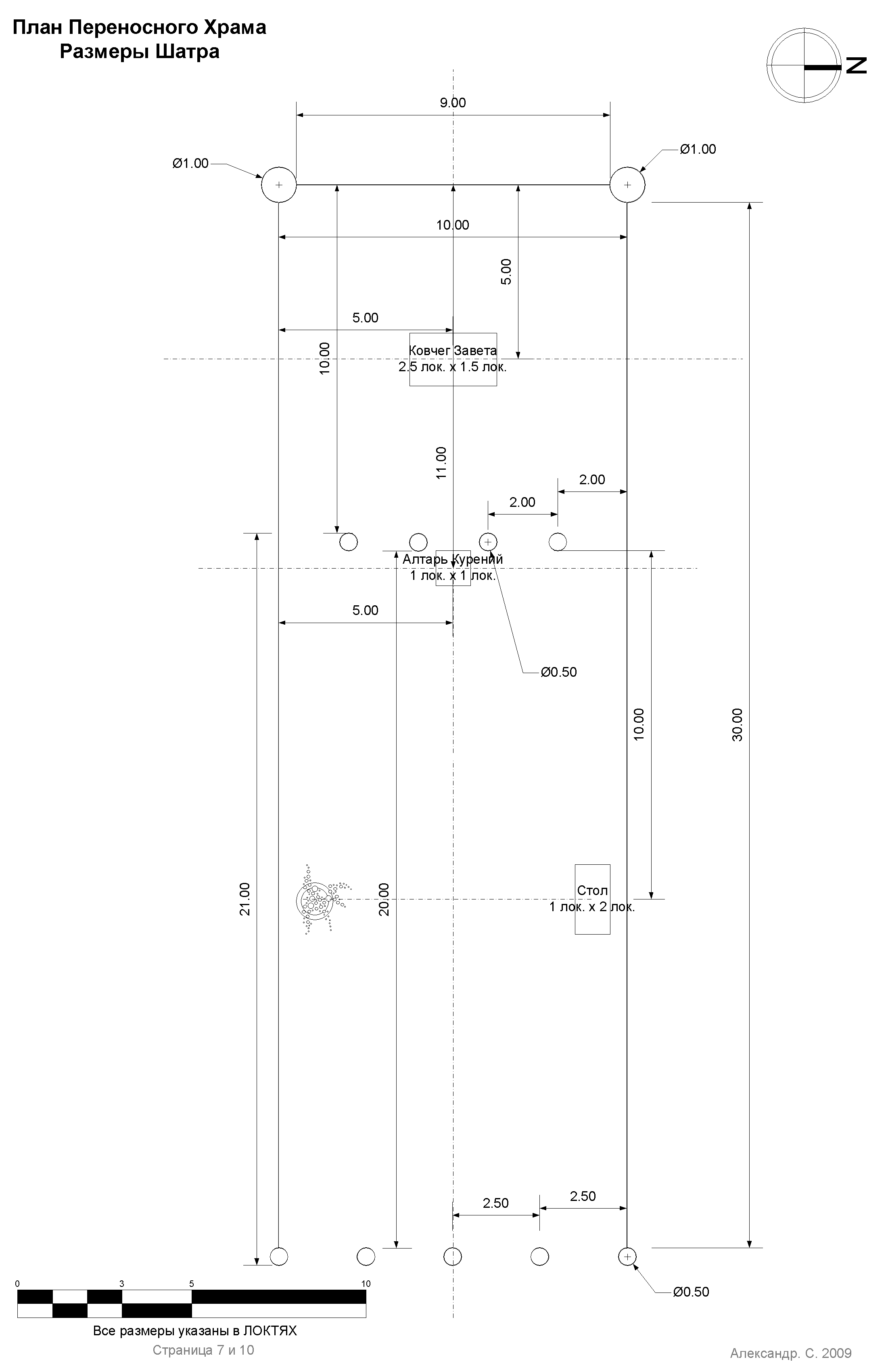 Переносной Храм (Скиния Собрания Мишкан) - Детальное Расположение и Размеры Шатра.